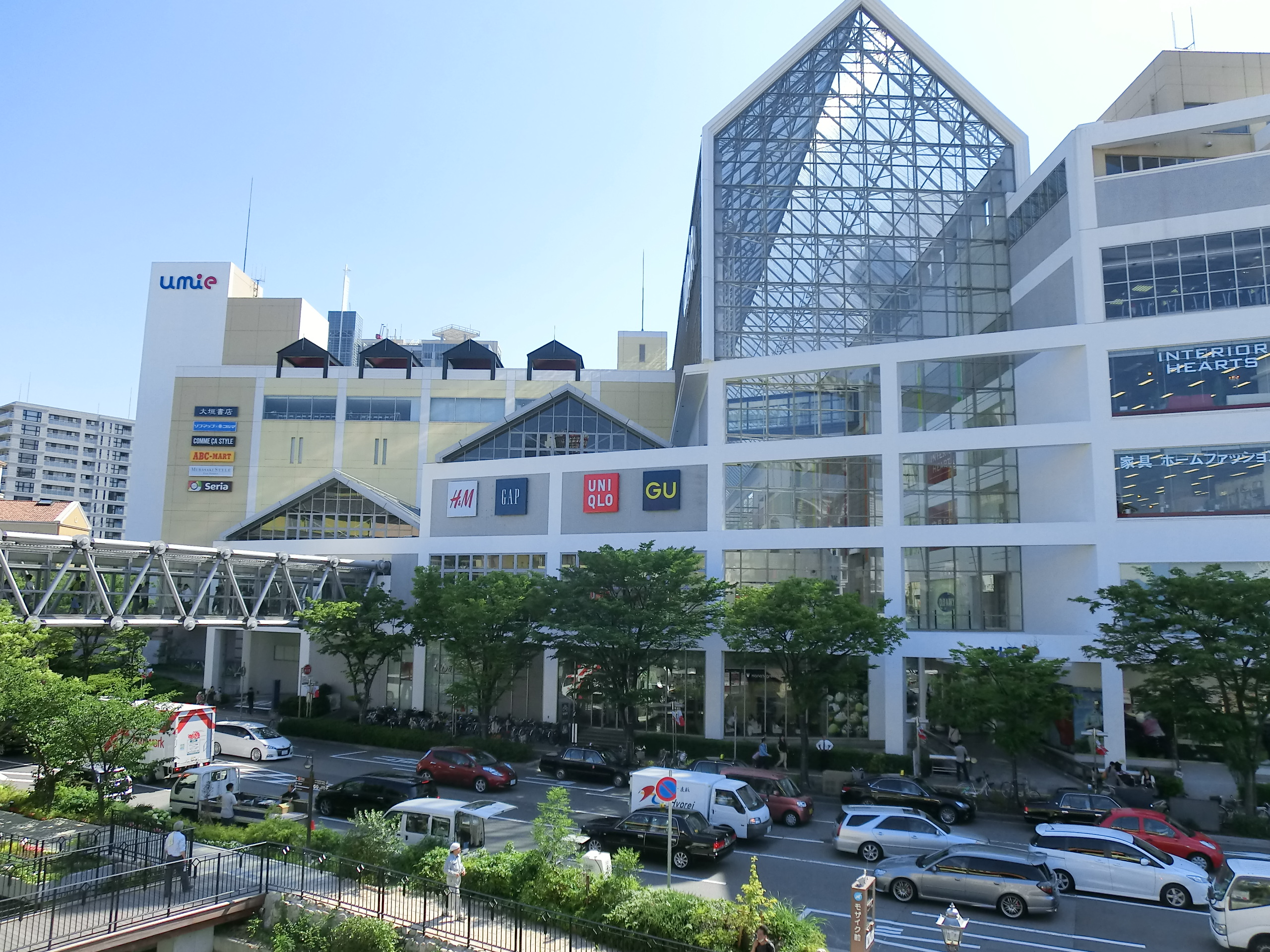 umie NORTH MALLの写真です。 2013年6月29日15：03撮影。